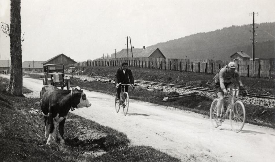 Spaarnestad Photo, SFA022004646 De Belg Jules Buysse, die een koe passeert, zal na een lange ontsnapping de eerste etappe winnen (Evian-Mulhouse, 373 km). Tour de France 1926, 20 juni. Plaats onbekend. Collectie SPAARNESTAD PHOTO/Het Leven Cow looking at racing cyclist Jules Buysse, who will win the first stage (Evian-Mulhouse). Tour de France 1926. Location unknown. Voor meer informatie en voor meer foto’s uit de collectie van Spaarnestad Photo, bezoek onze Beeldbank: U kunt ons helpen onze kennis van de fotocollecties te verrijken door tags en commentaren toe te voegen. Herkent u mensen of locaties of heeft u een bijzonder verhaal te vertellen bij één van de foto’s, laat dan een reactie achter (als u ingelogd bent bij Flickr) of stuur een mailtje naar: You can help us gain more knowledge on the content of our collection by simply adding a comment with information. If you do not wish to log in, you can write an e-mail to